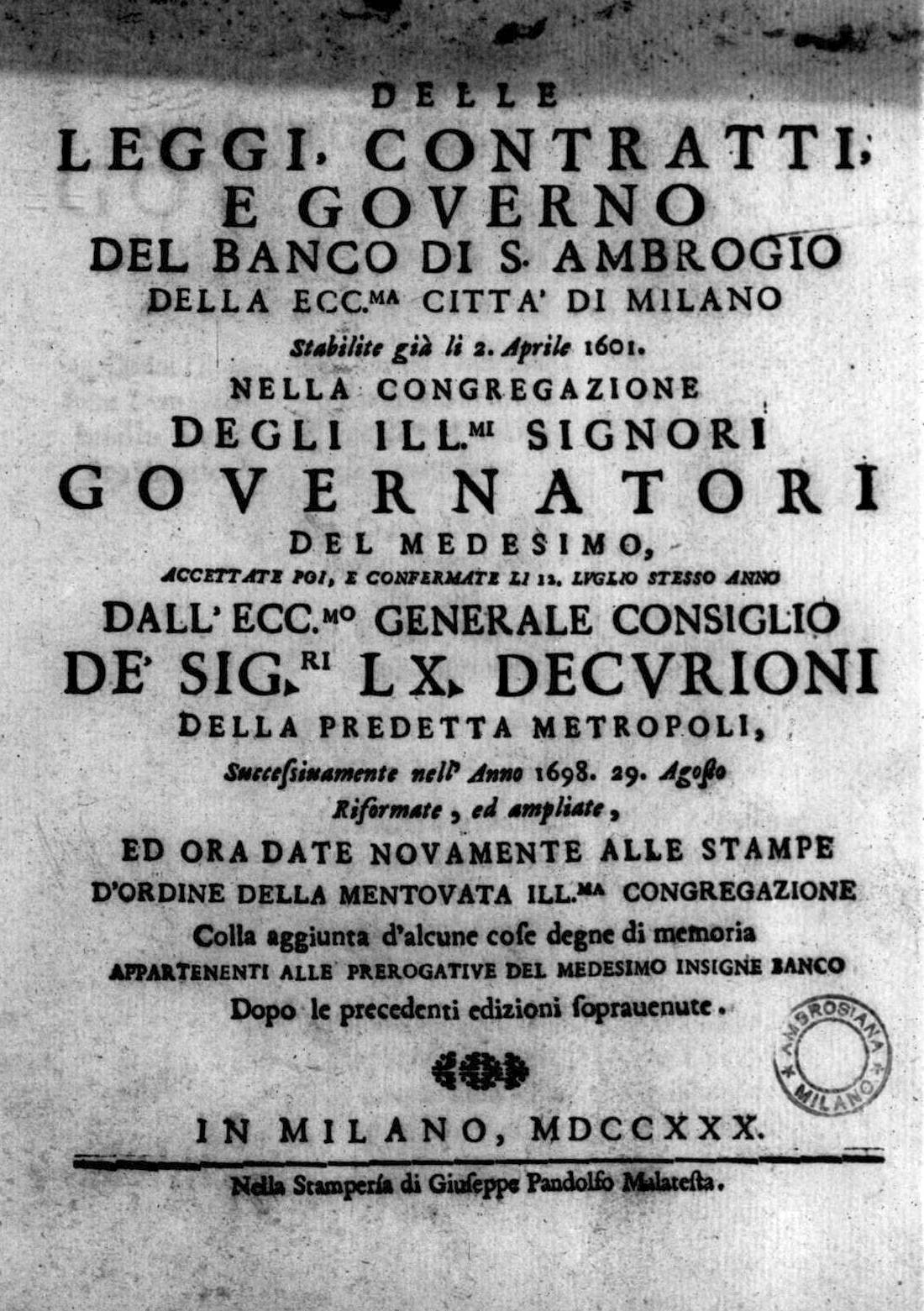 Frontespizio